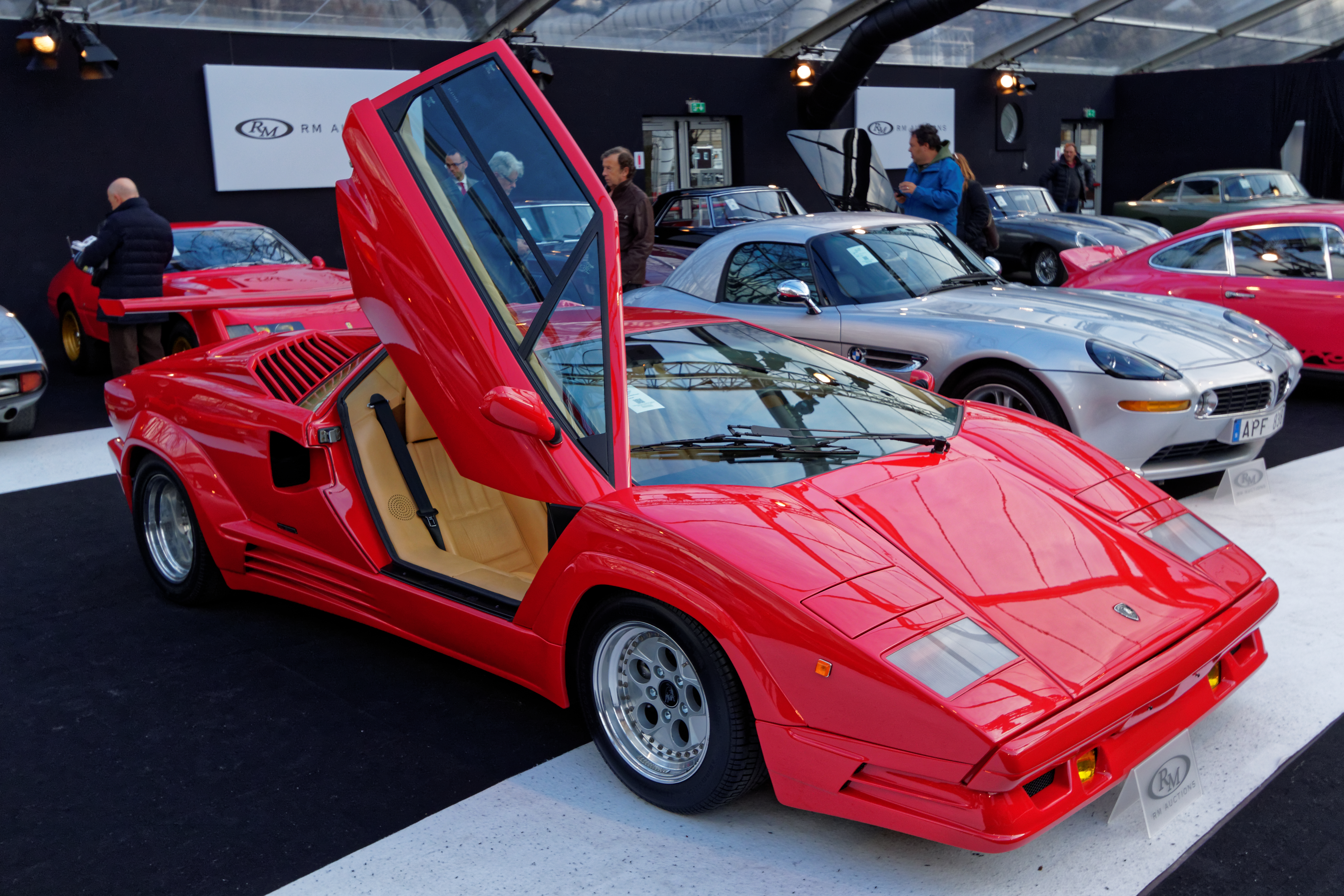 La vente aux enchères RM auctions aux pied des Invalides à Paris le 4 février 2015.